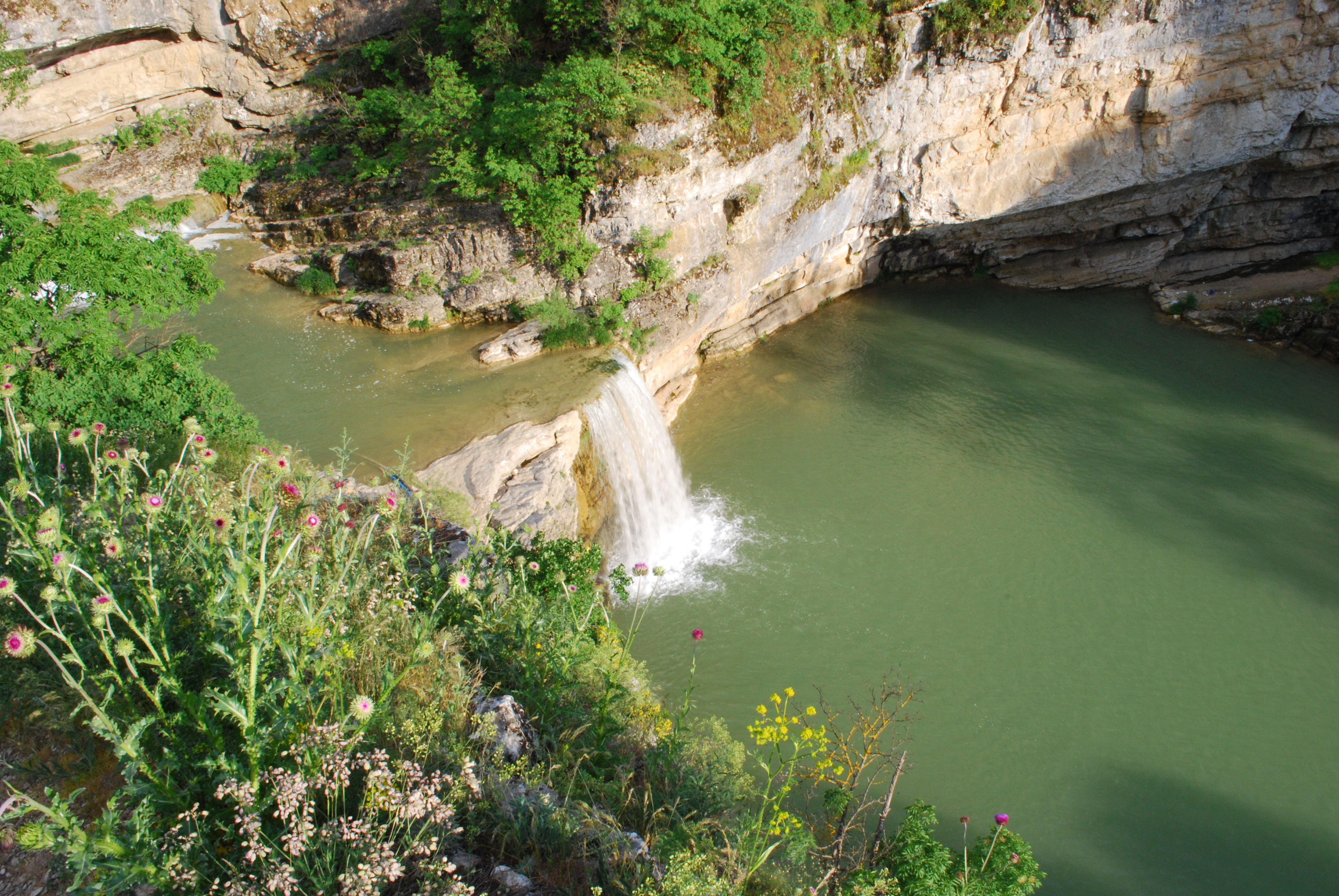 Mirusha